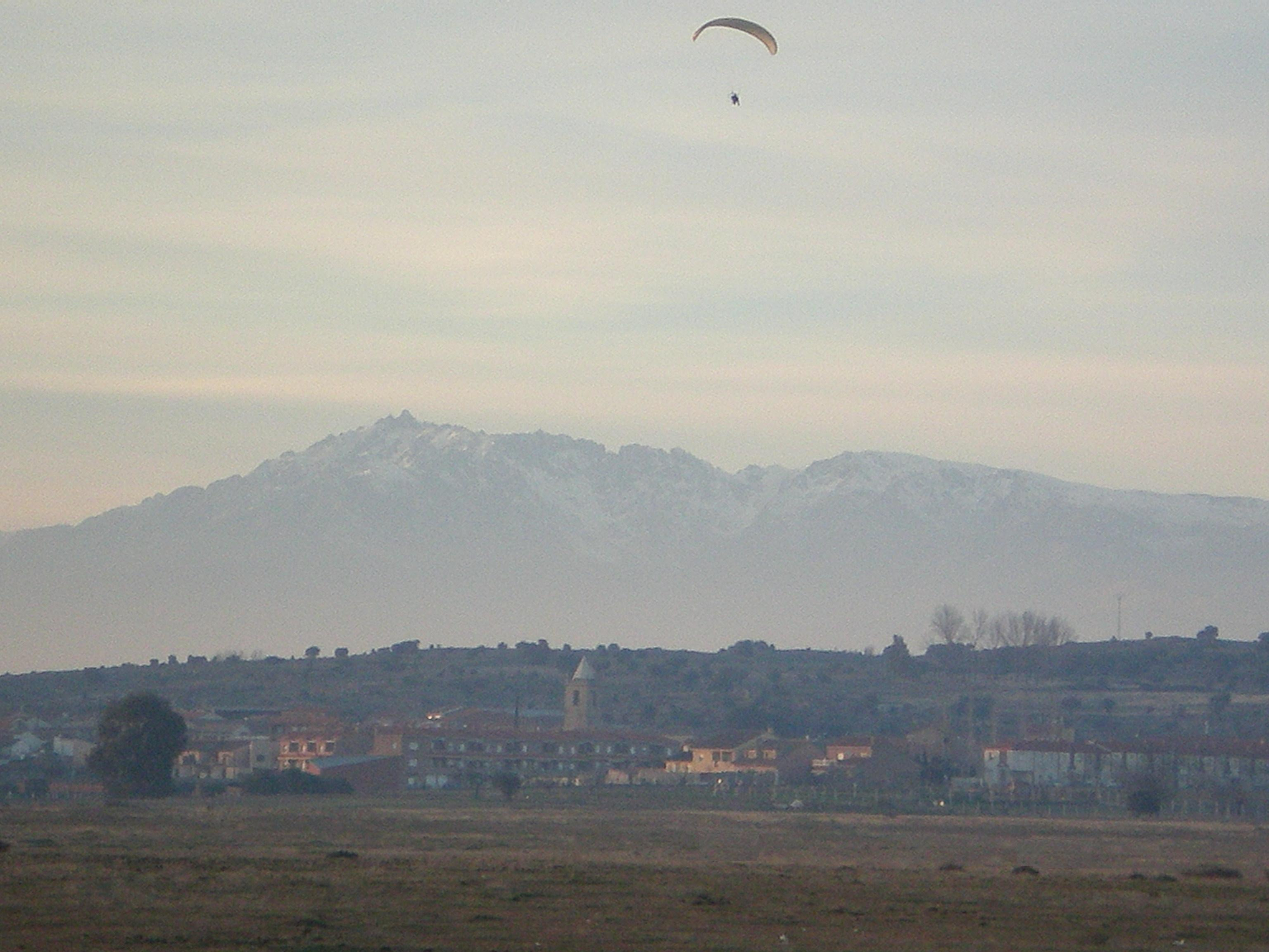 Panorámica de Gamonal con la Sierra de Gredos al fondo